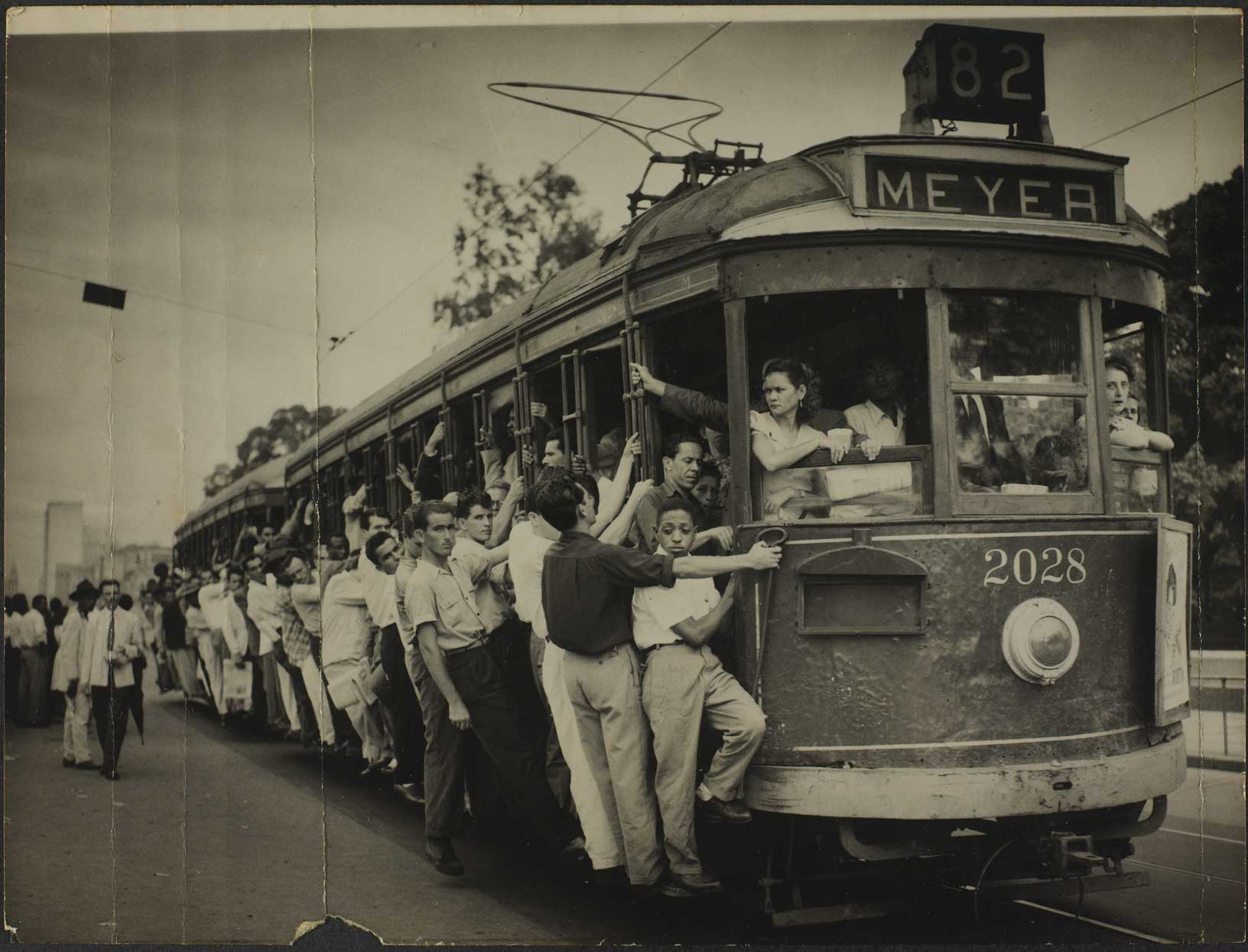 Título [Bonde destino Meyer] [Iconográfico] Imprenta [Rio de Janeiro] : [s.n.], [19--].